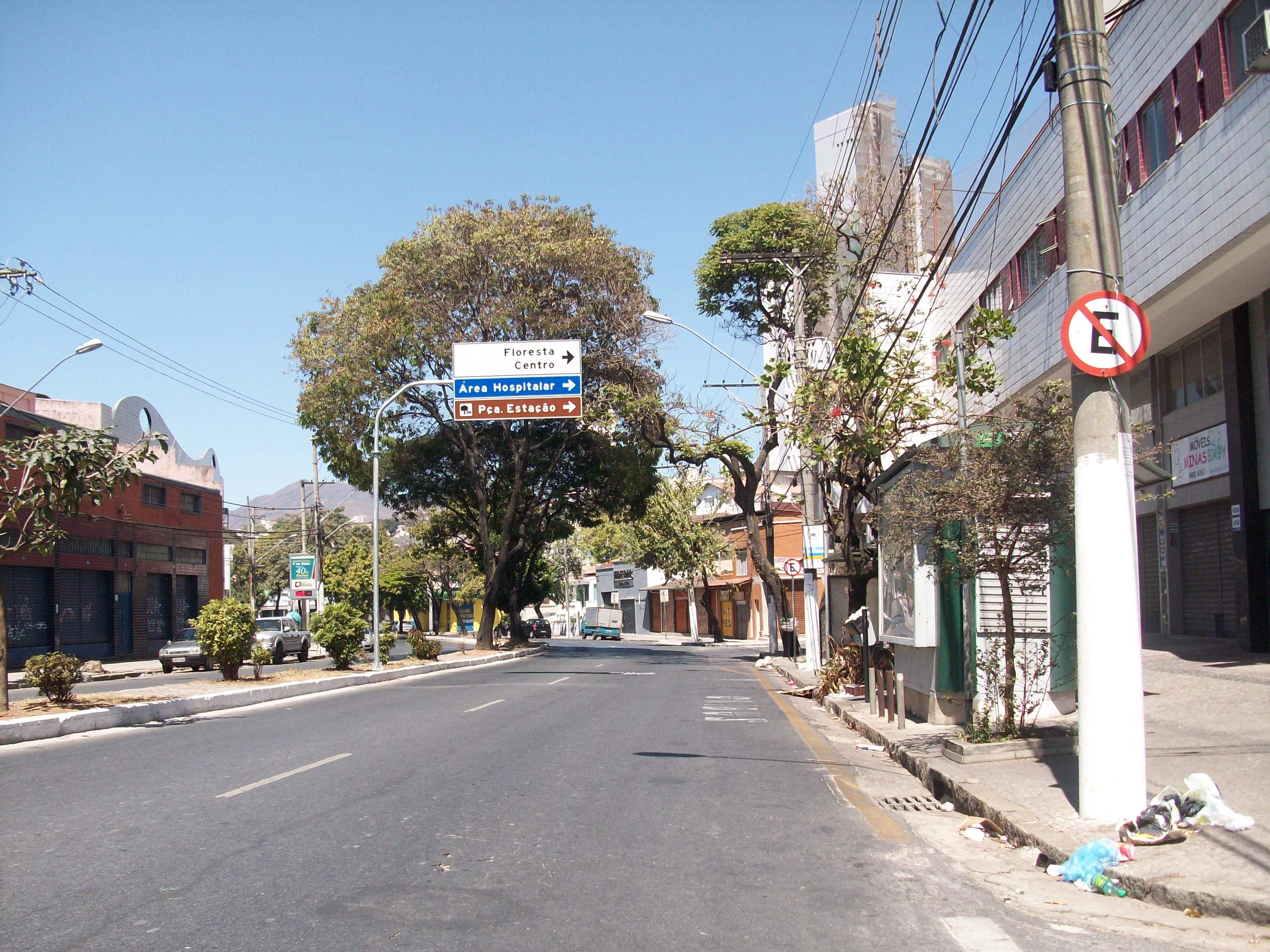 Bairro Sagrada Família (Belo Horizonte), Brasil.